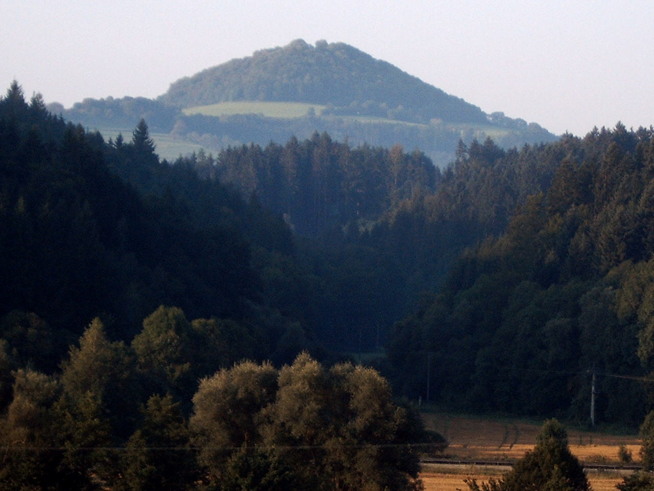 Der Berg Hohenstaufen vom Remstal aus